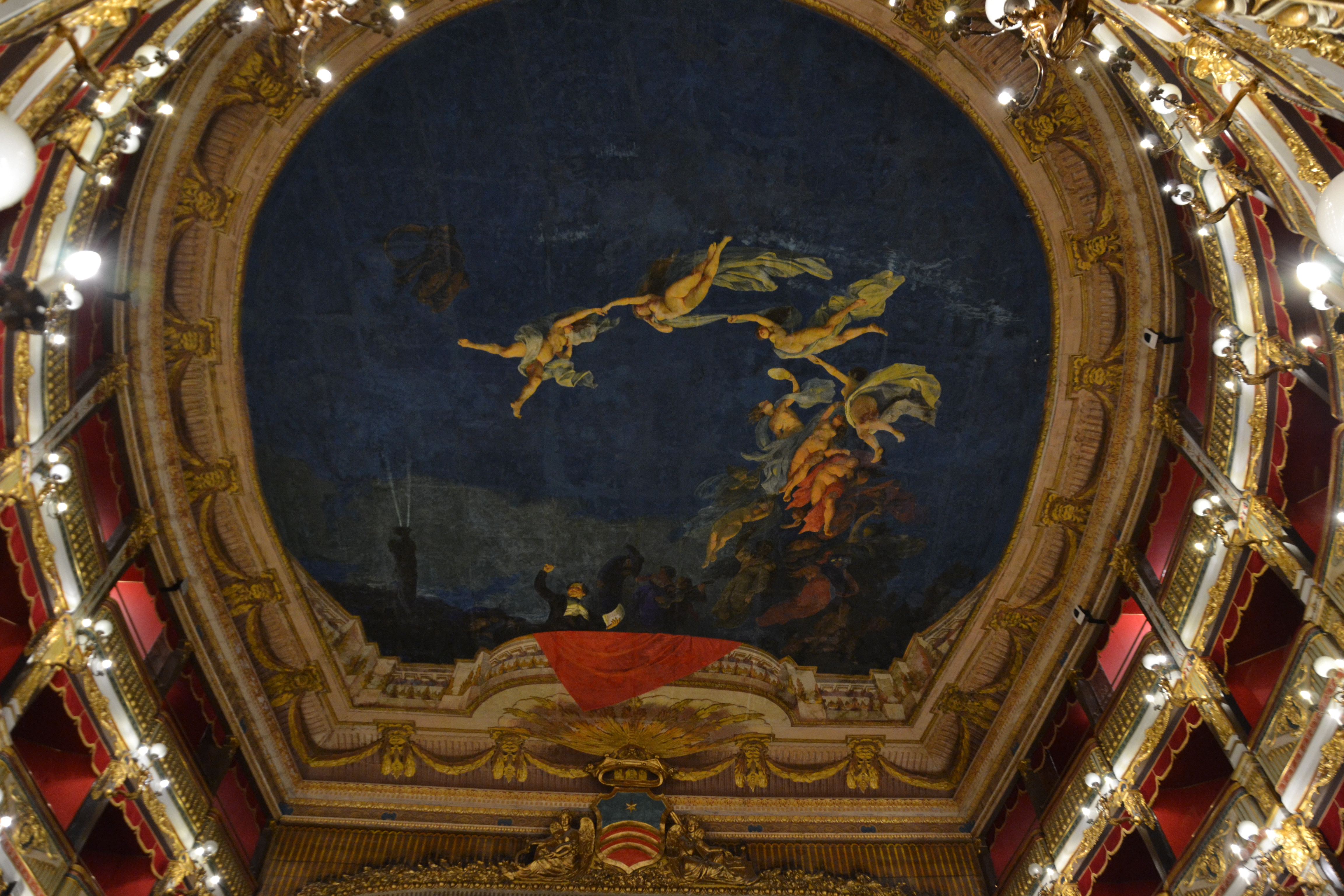 Plafond teatro Verdi Salerno